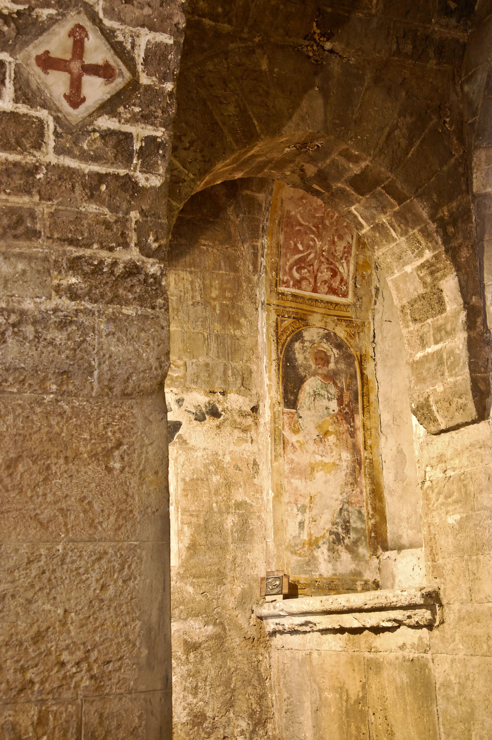 Interno della chiesa di Santa Cristina la Vetere, Palermo